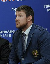 Посещение московской гимназии №1519. Олимпийский урок ведут чемпионка Олимпийских игр в Лондоне по спортивной гимнастике Алия Мустафина (слева) и серебряный призёр Игр дзюдоист Александр Михайлин.